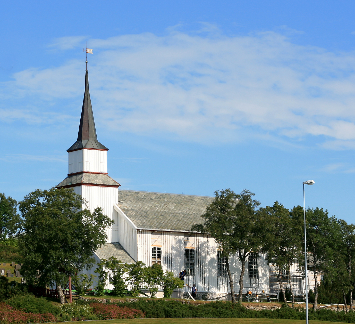 Kolvereid church, Nærøy, Nord-Trøndelag, Norway.